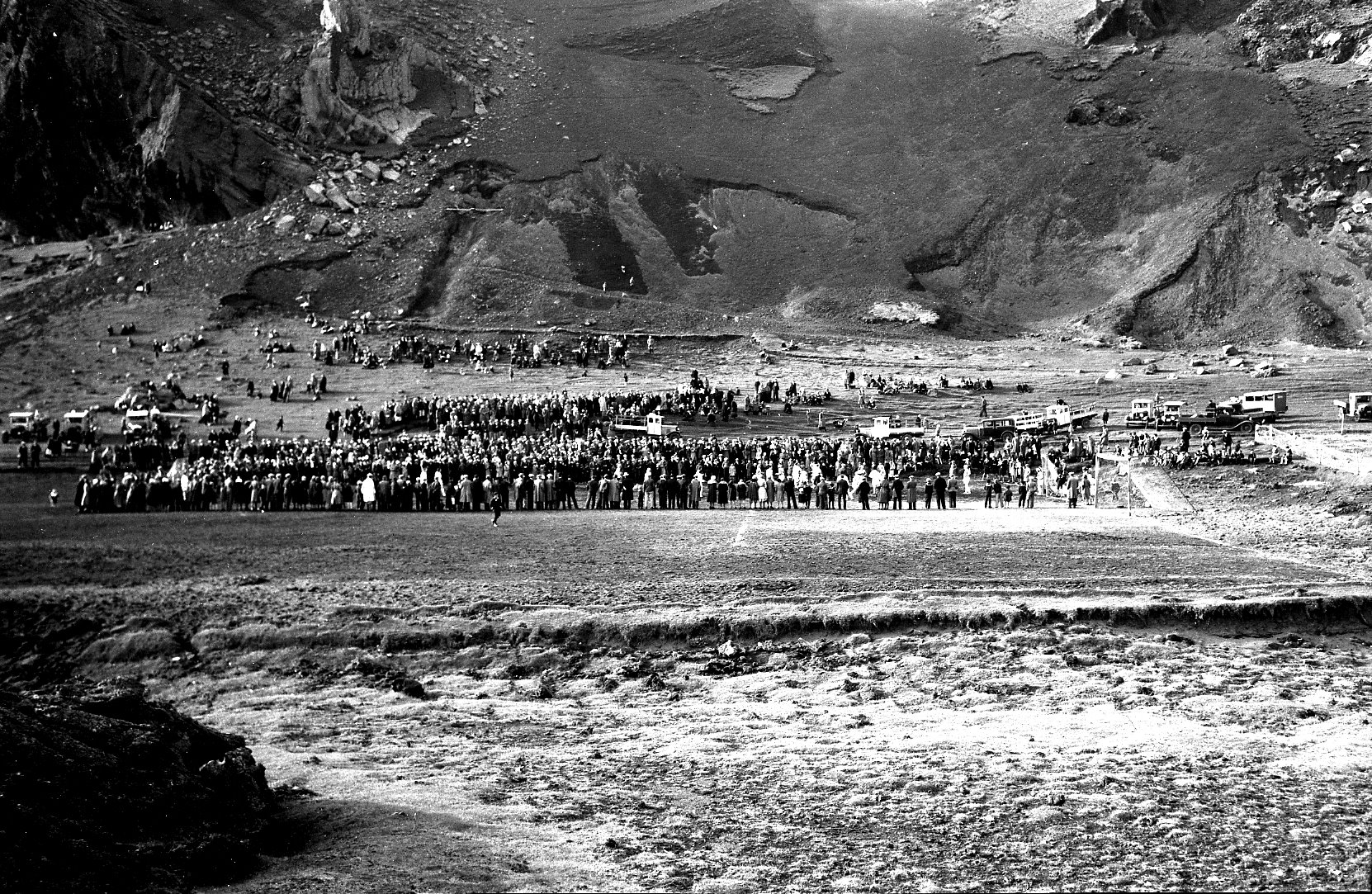 Hásteinsvöllur á öðrum eða þriðja áratug 19 aldar